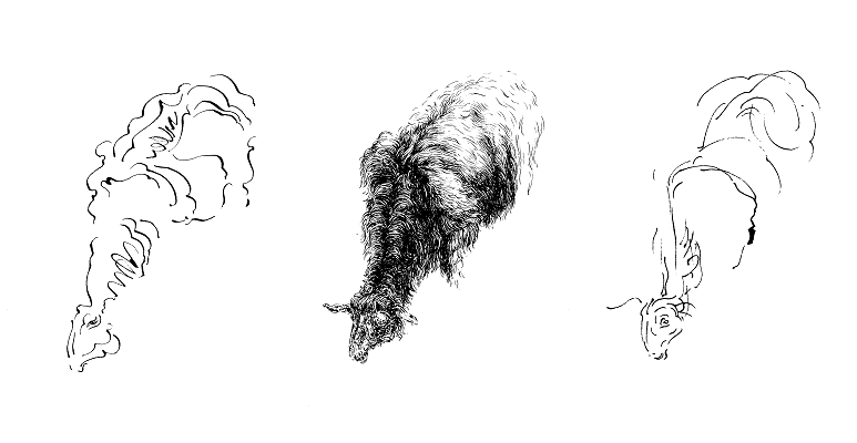 Emmanuel Fournier, page du livre "La même chose", éditions Corduriès, 1993, 2007